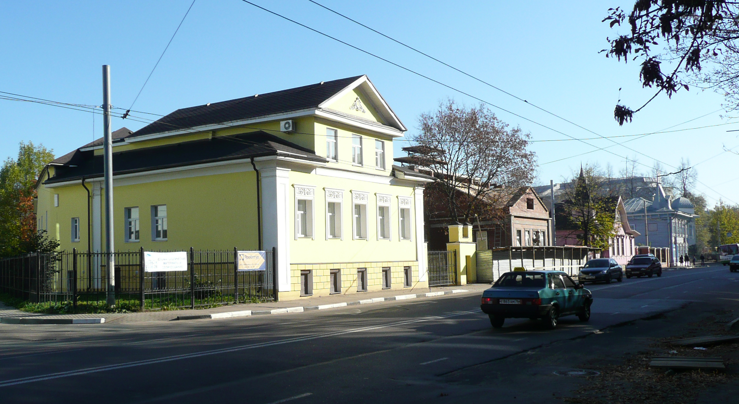 Историческая застройка Советской улицы в Ярославле